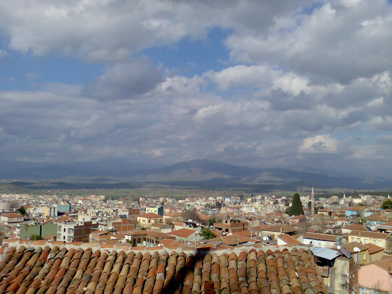 Dere kahve by qokay